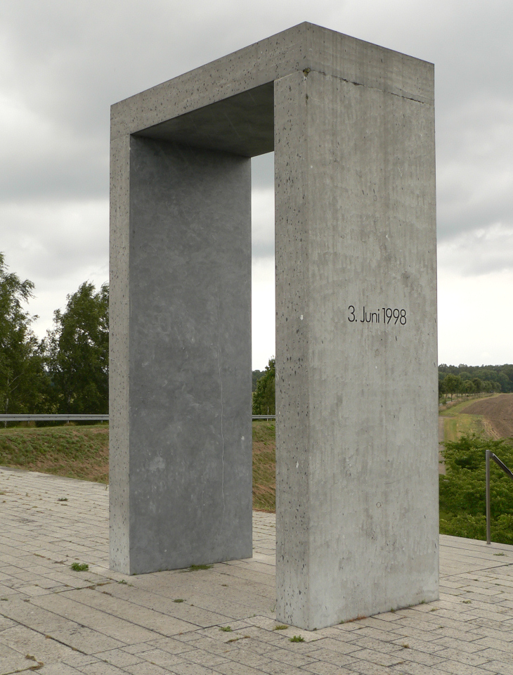 Gedenkstätte Eschede